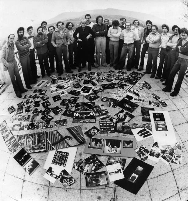 Fiatalok Fotóművészeti Stúdiójának tagjai, Tahitótfalu, 1978 fotó: Urbán Tamás forrás: képszám: 47211 FORTEPAN© 2010-2014. under Creative Commons CC-BY-SA-3.0 licence